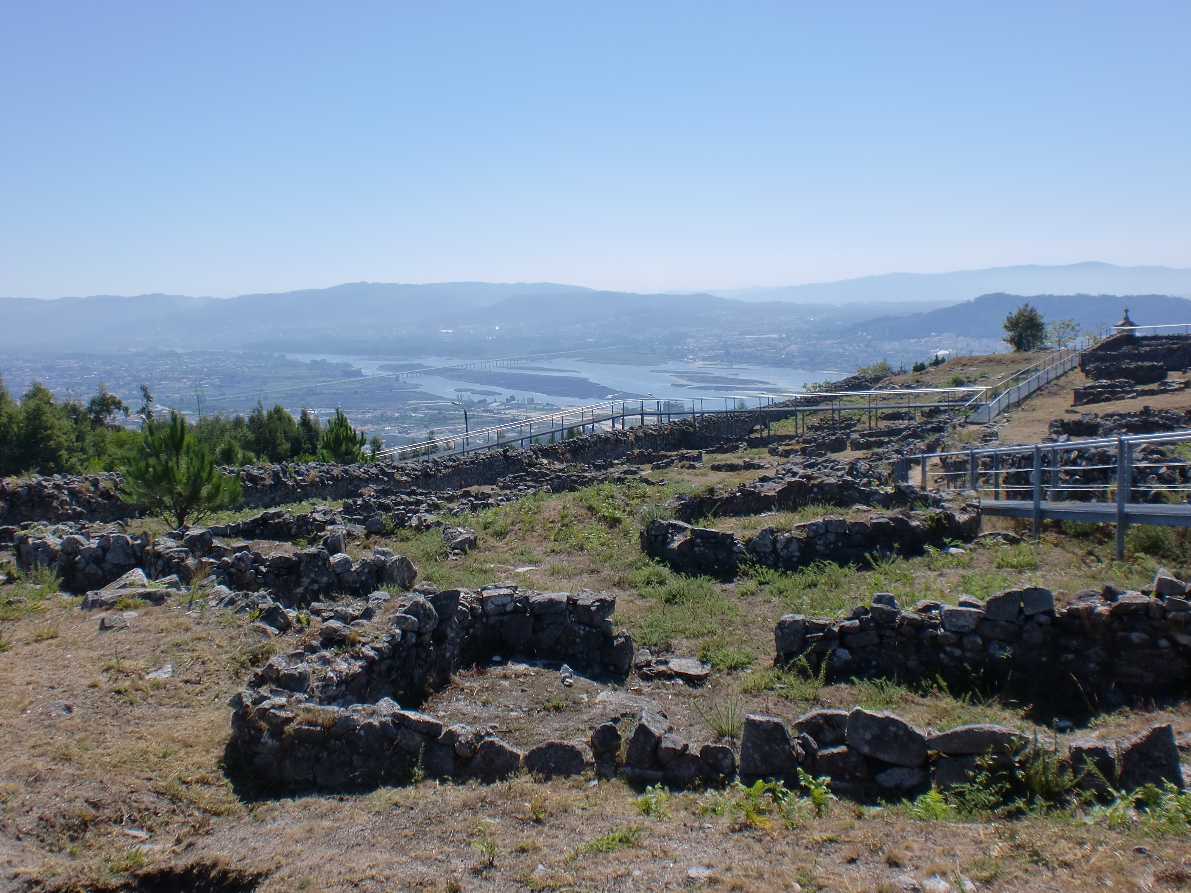 Vista para a cidade de Viana do Castelo a partir das Ruínas da Cidade Velha de Santa Luzia.